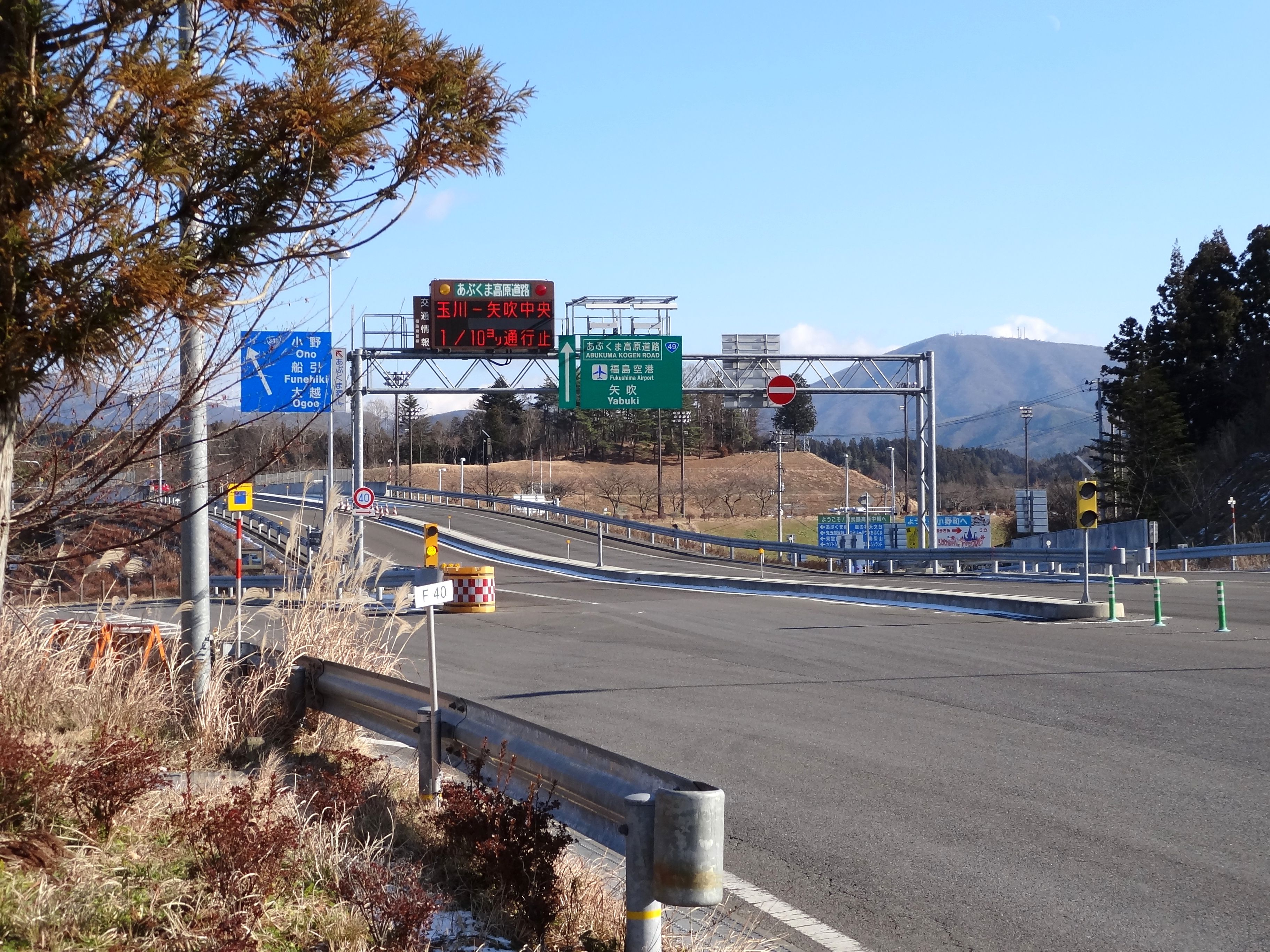 小野インターチェンジ（磐越道とあぶくま高原道路の接続地点付近）